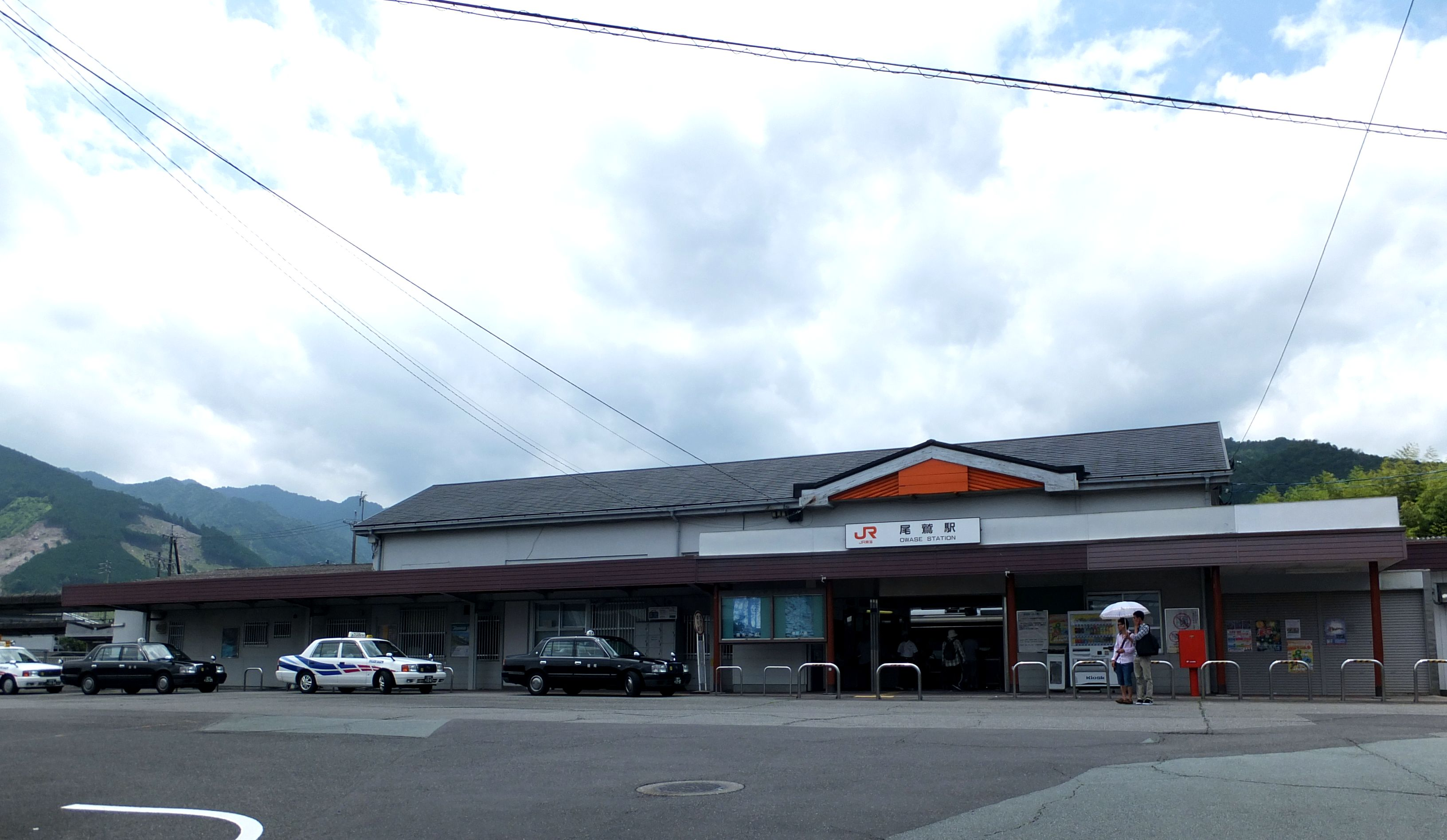 尾鷲駅駅舎